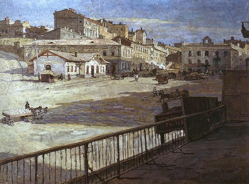 Custom Square